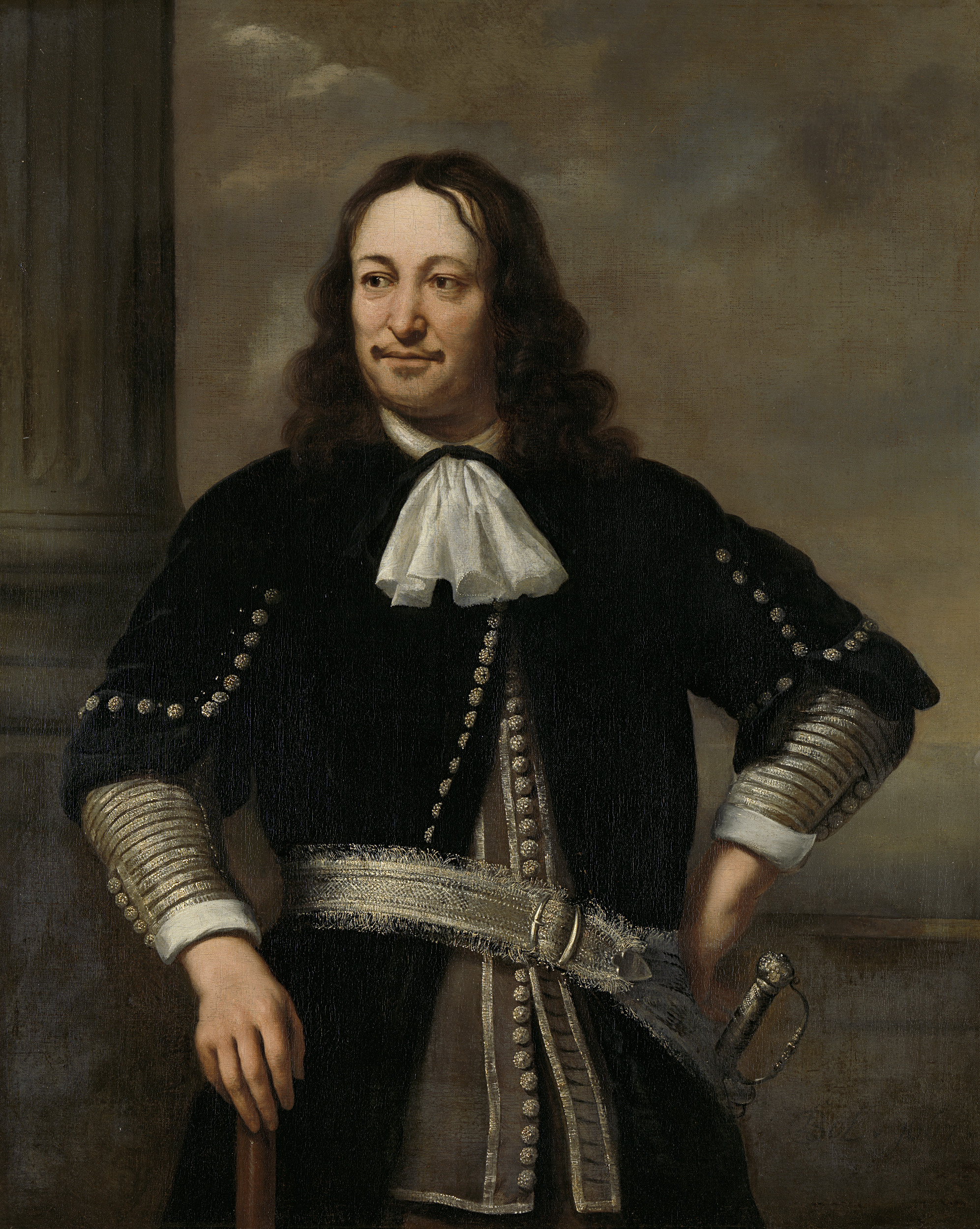 Portret van een zee-overste, waarschijnlijk vice-admiraal Aert van Nes (1626-1693), staande, driekwart naar links, links op de achtergrond een colonnade. Collection: schilderijen; marinemodellenkamer